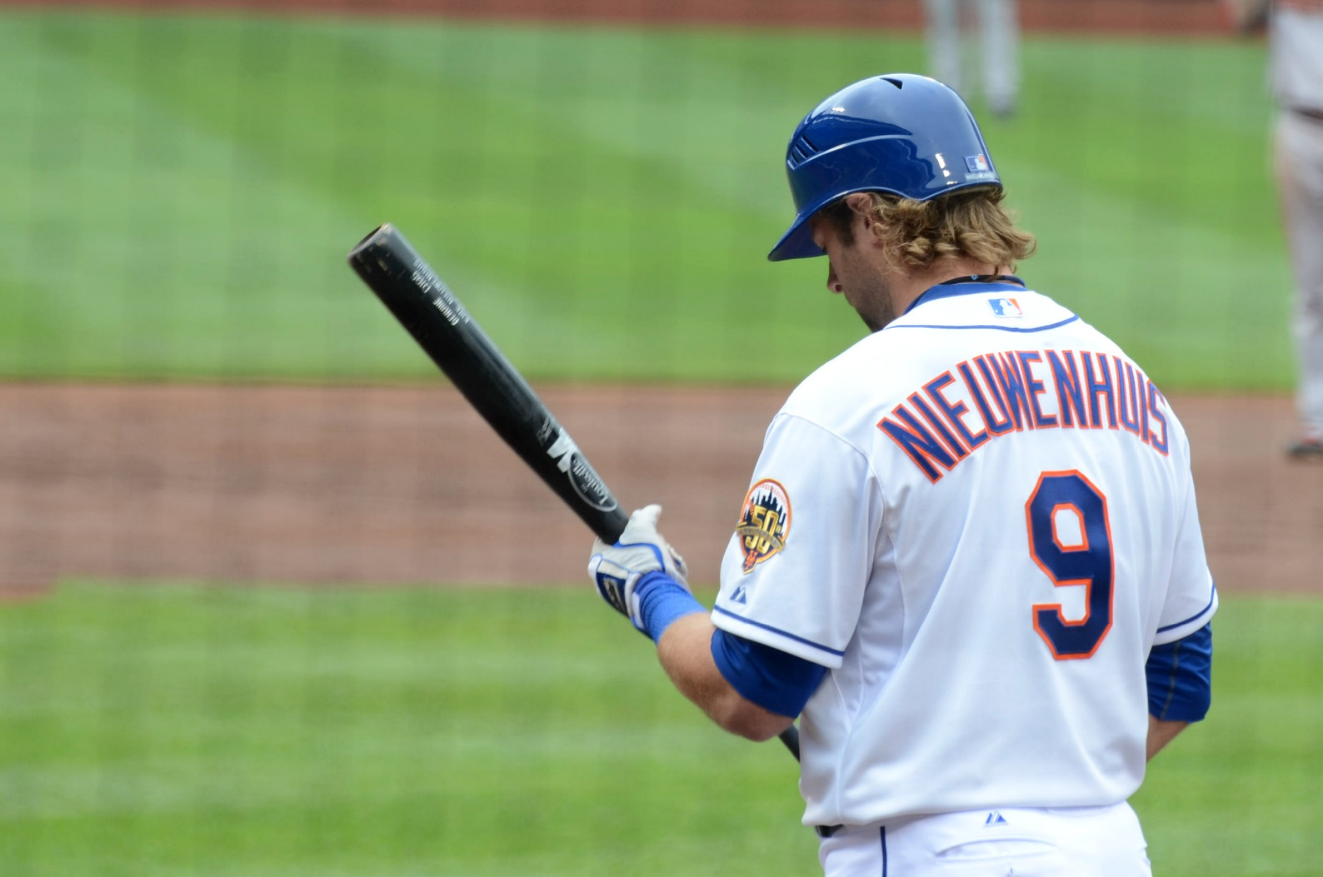 Kirk Nieuwenhuis